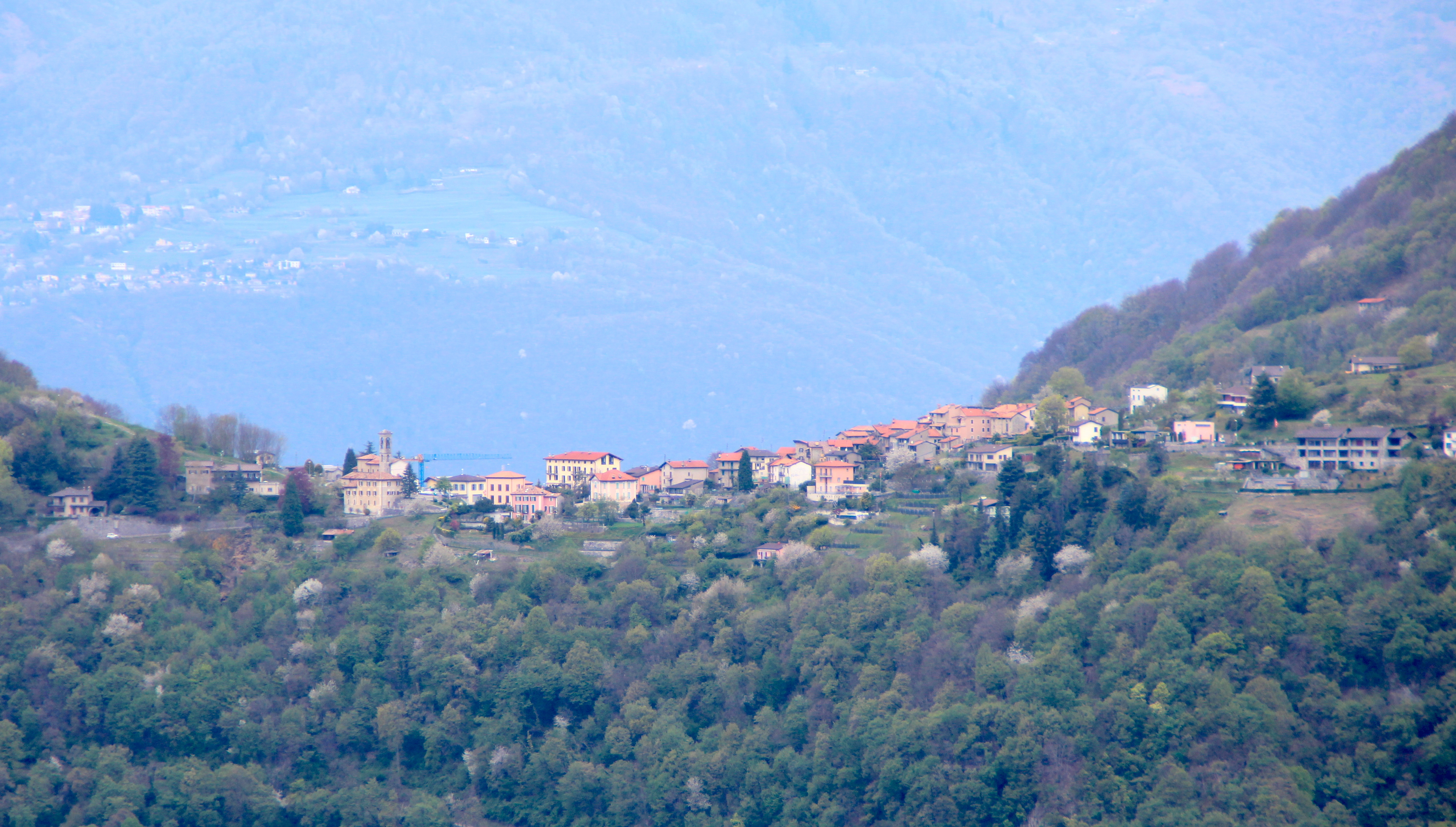 Brè